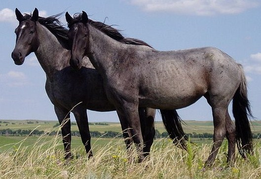 Two young Nokota mares